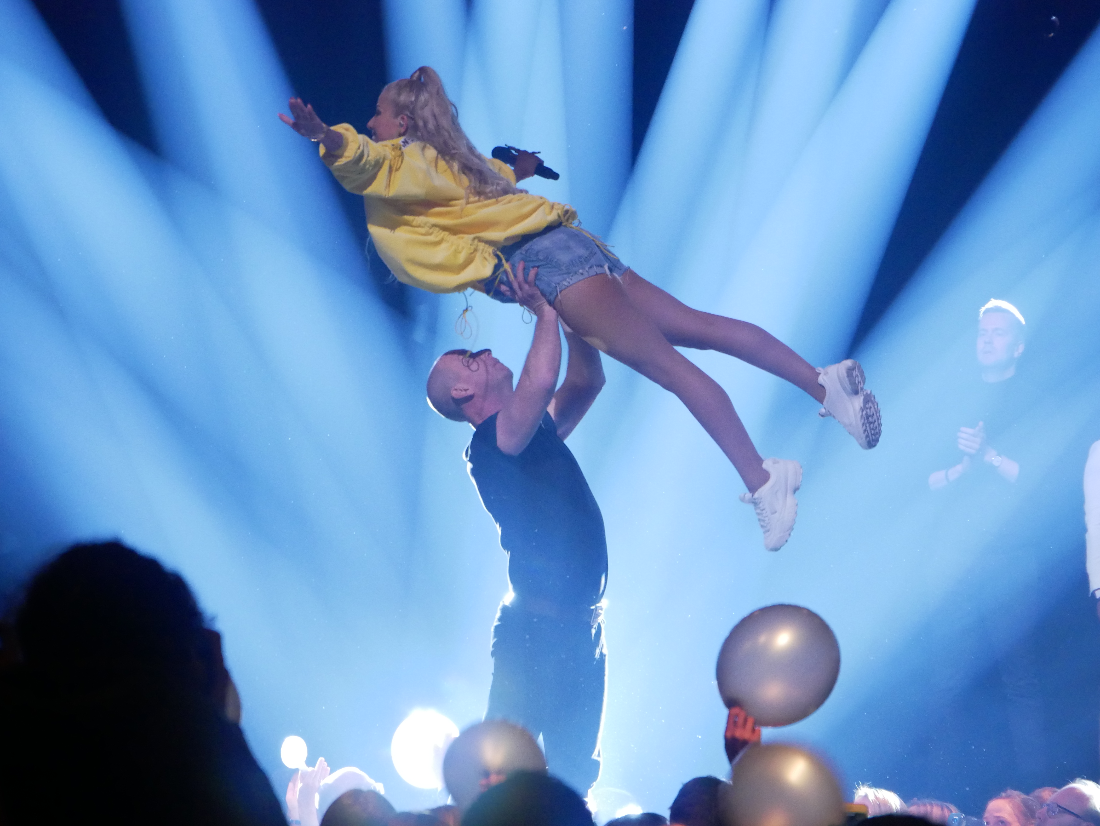 Melodifestivalen 2018, Deltävling 1, Löfbergs Arena, Karlstad Sigrid Bernson, Melodifestivalen 2018